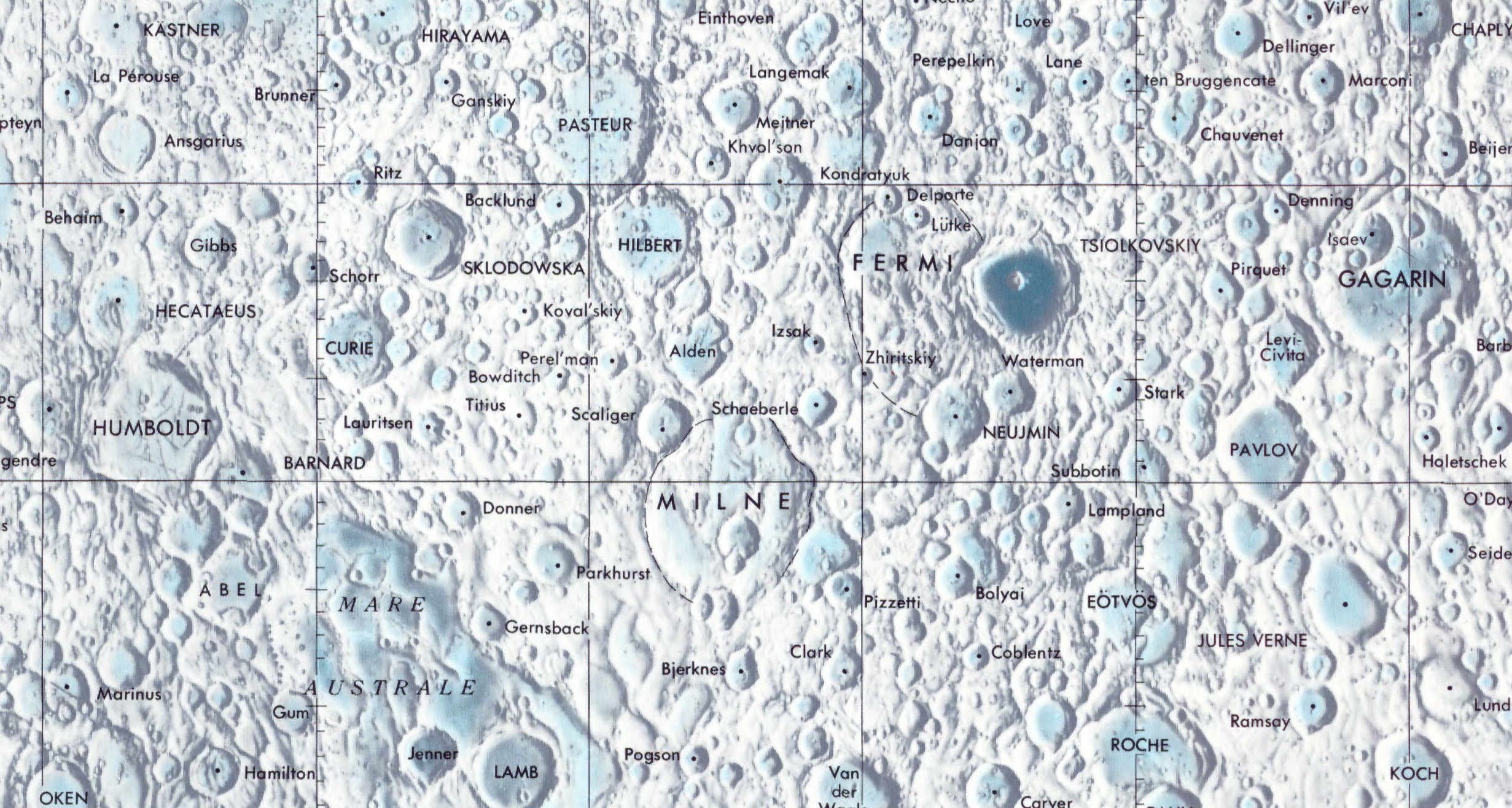 Cráter lunar Milne. Localización. (Imagen mapa misión Clementine)